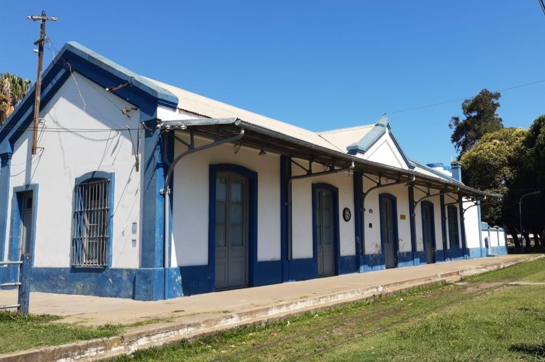 Estación Capitán Bermudez del Ferrocarril Belgrano, ramal F1.